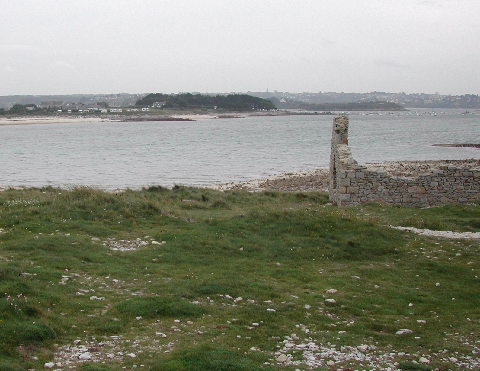 Île-Grande vue de l'Ile d' Aganton. Pleumeur-Bodou dans les Côtes-d'Armor Bretagne